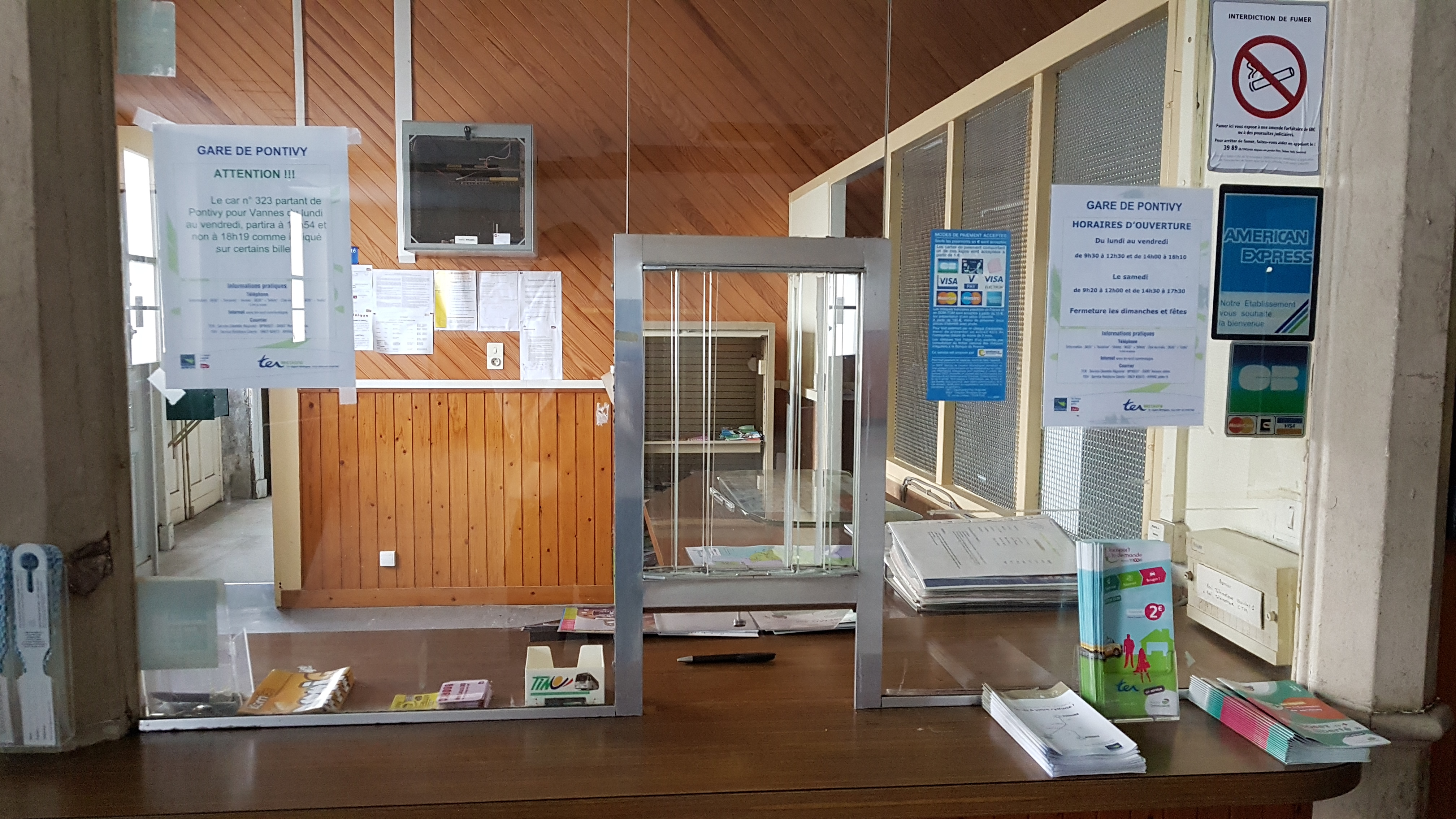 Guichet de la gare de Pontivy